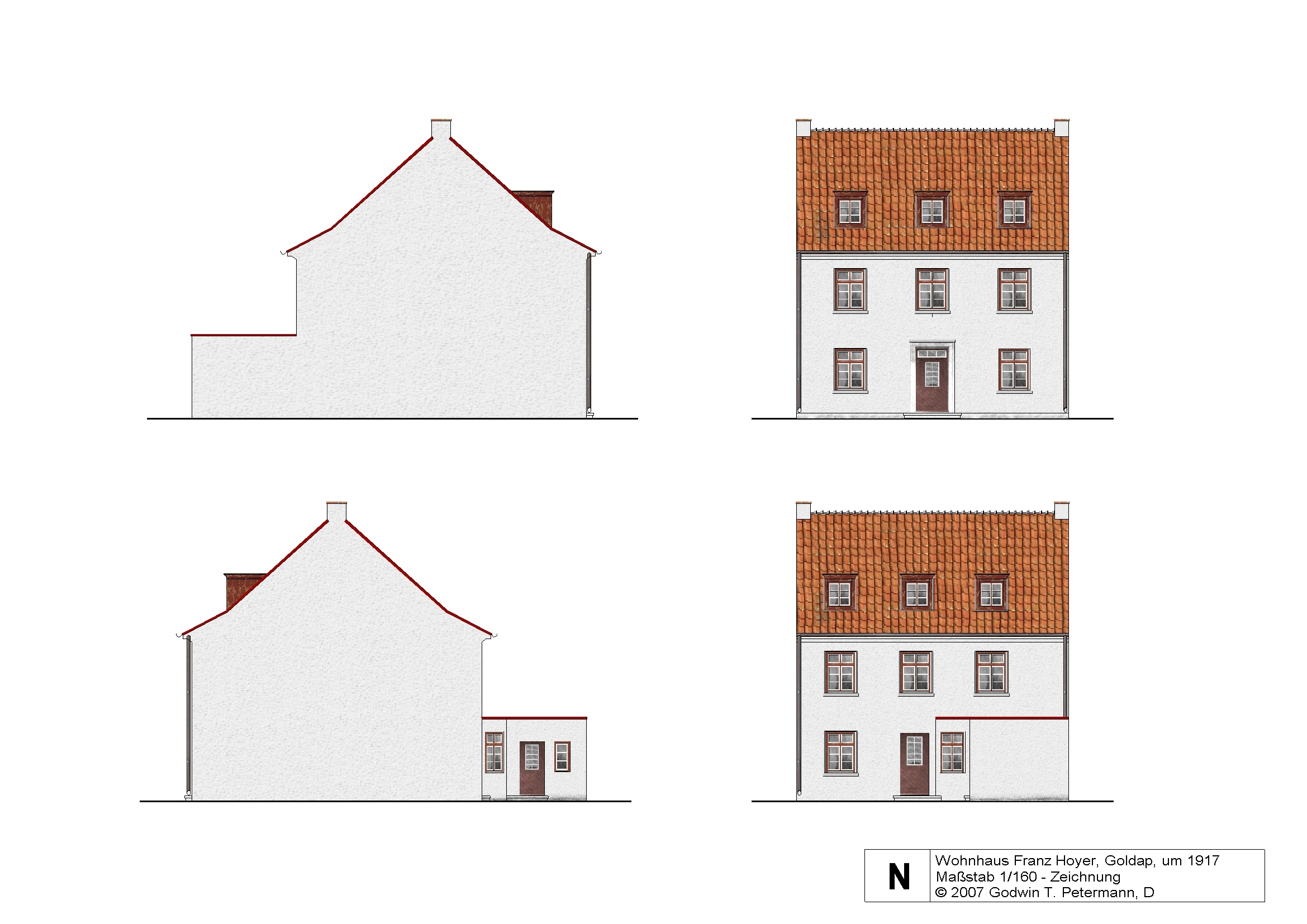 Zeichnung des Wohnhauses Franz Hoyer in Goldap von 1916/17 - Wiederaufbau Ostpreußens; Architekt: Hans J. Philipp, Goldap. Anmerkungen: Die Abbildung ist eine Kombination aus einer CAD-Zeichnung und fotorealistischen Texturen.